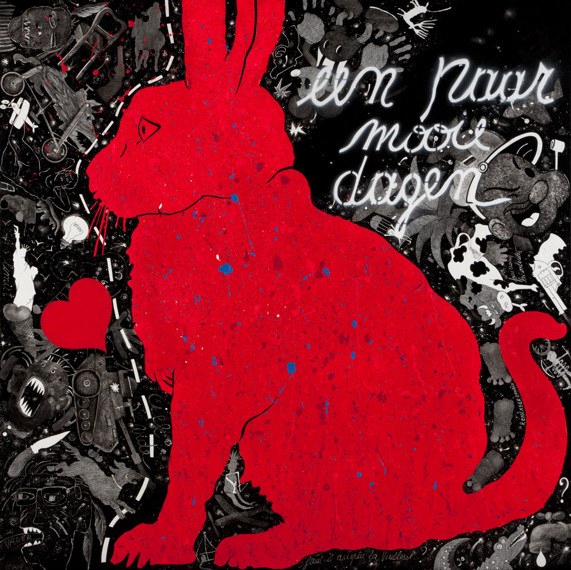 Werk van Christian Silvain